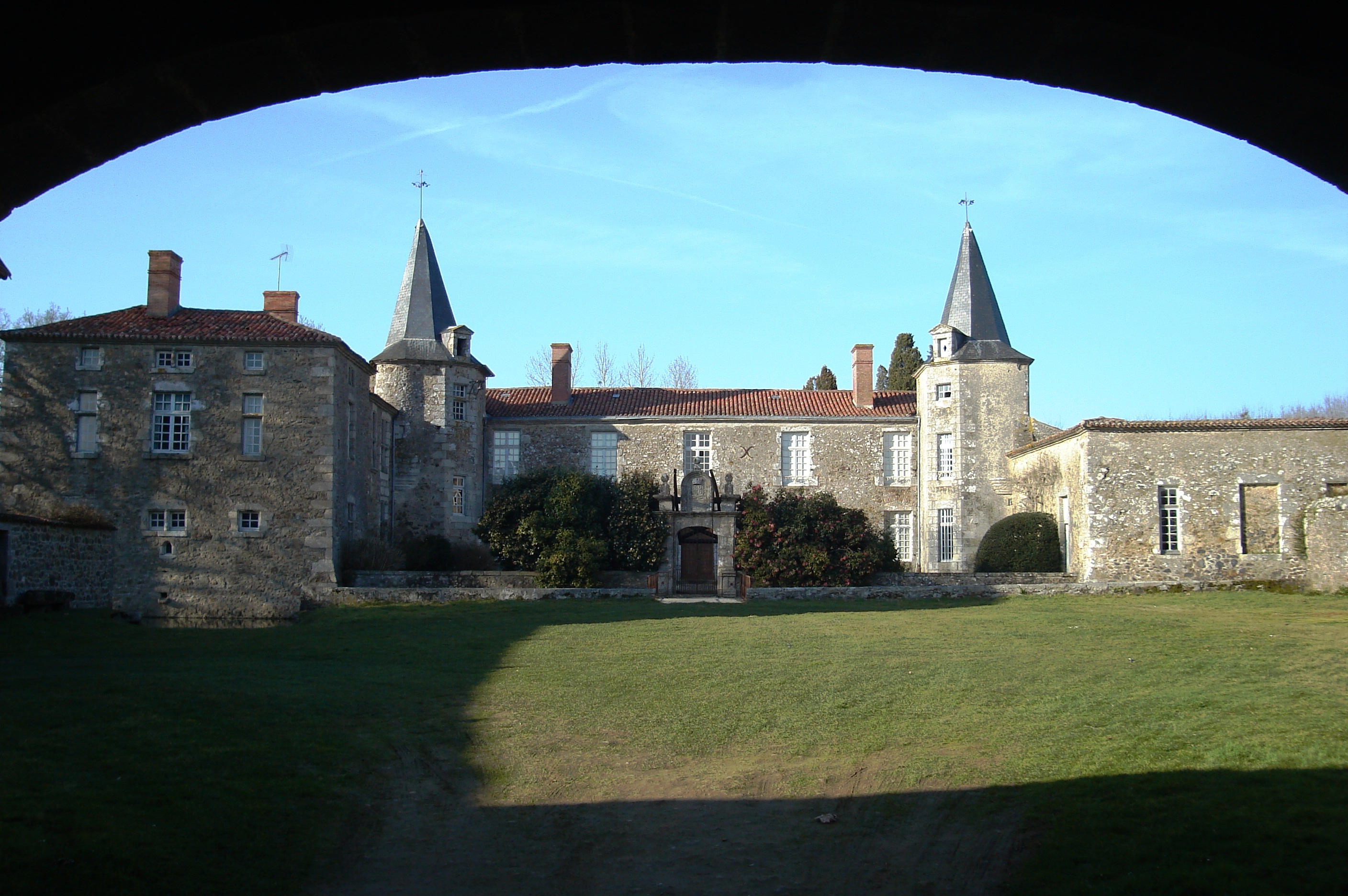 Château de la Bonnelière